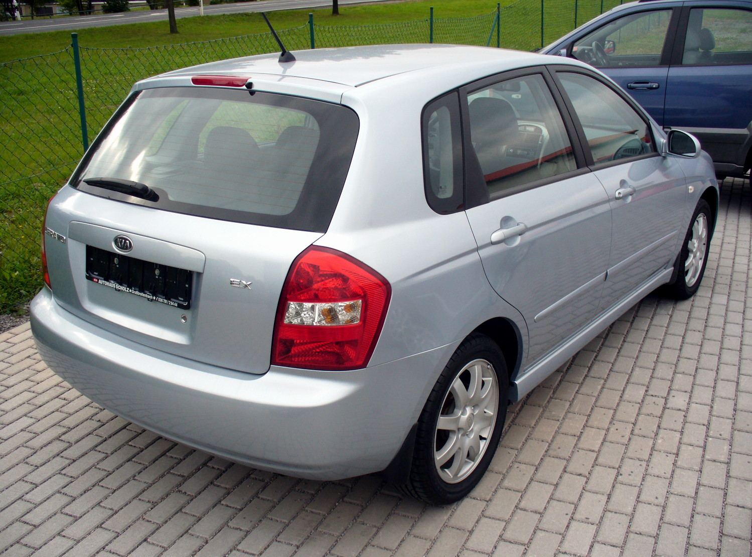 Kia Cerato